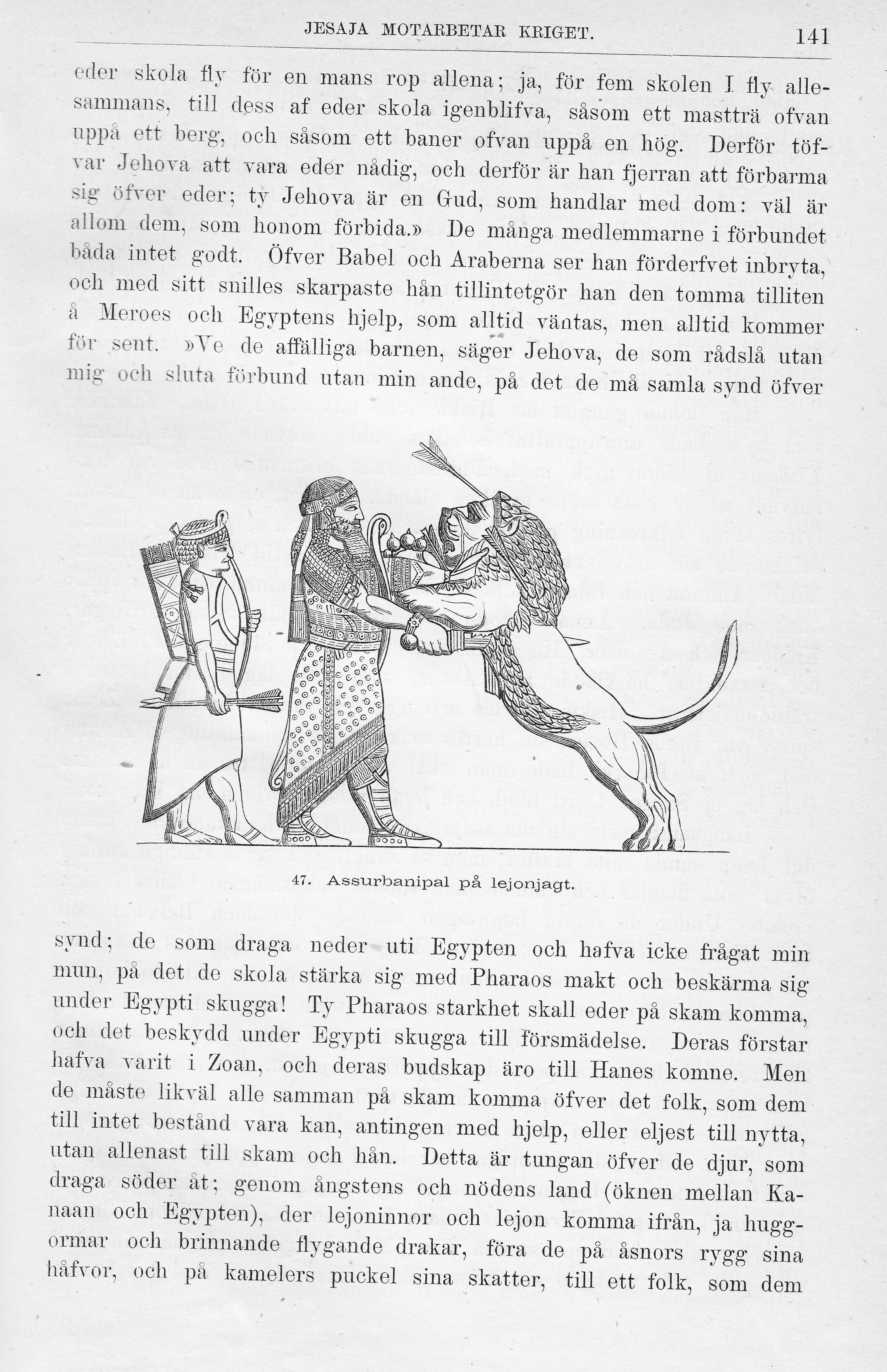 Illustrerad verldshistoria utgifven av E. Wallis. band I